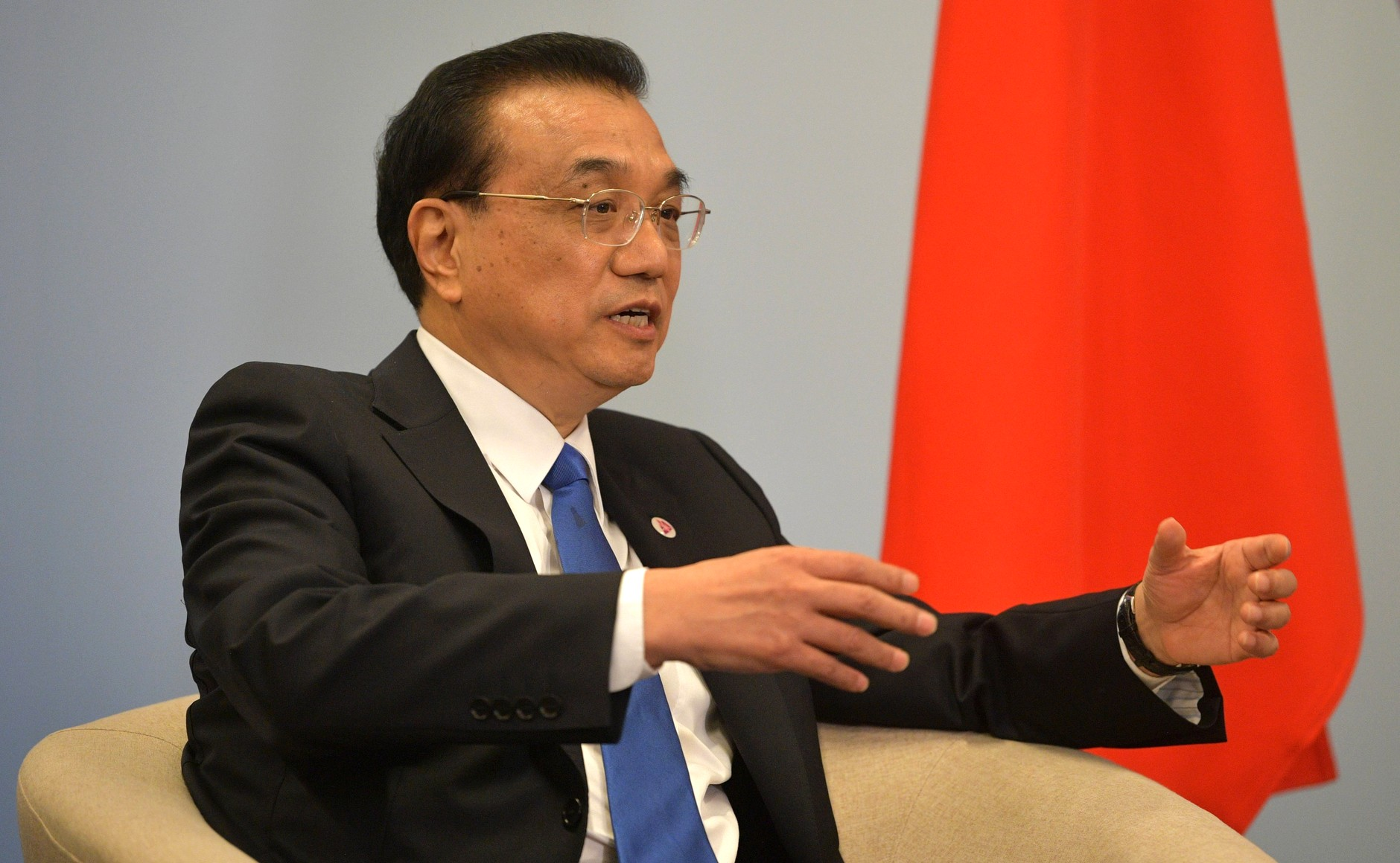 Премьер Государственного Совета КНР Ли Кэцян во время встречи с Президентом Российской Федерации Владимиром Путиным